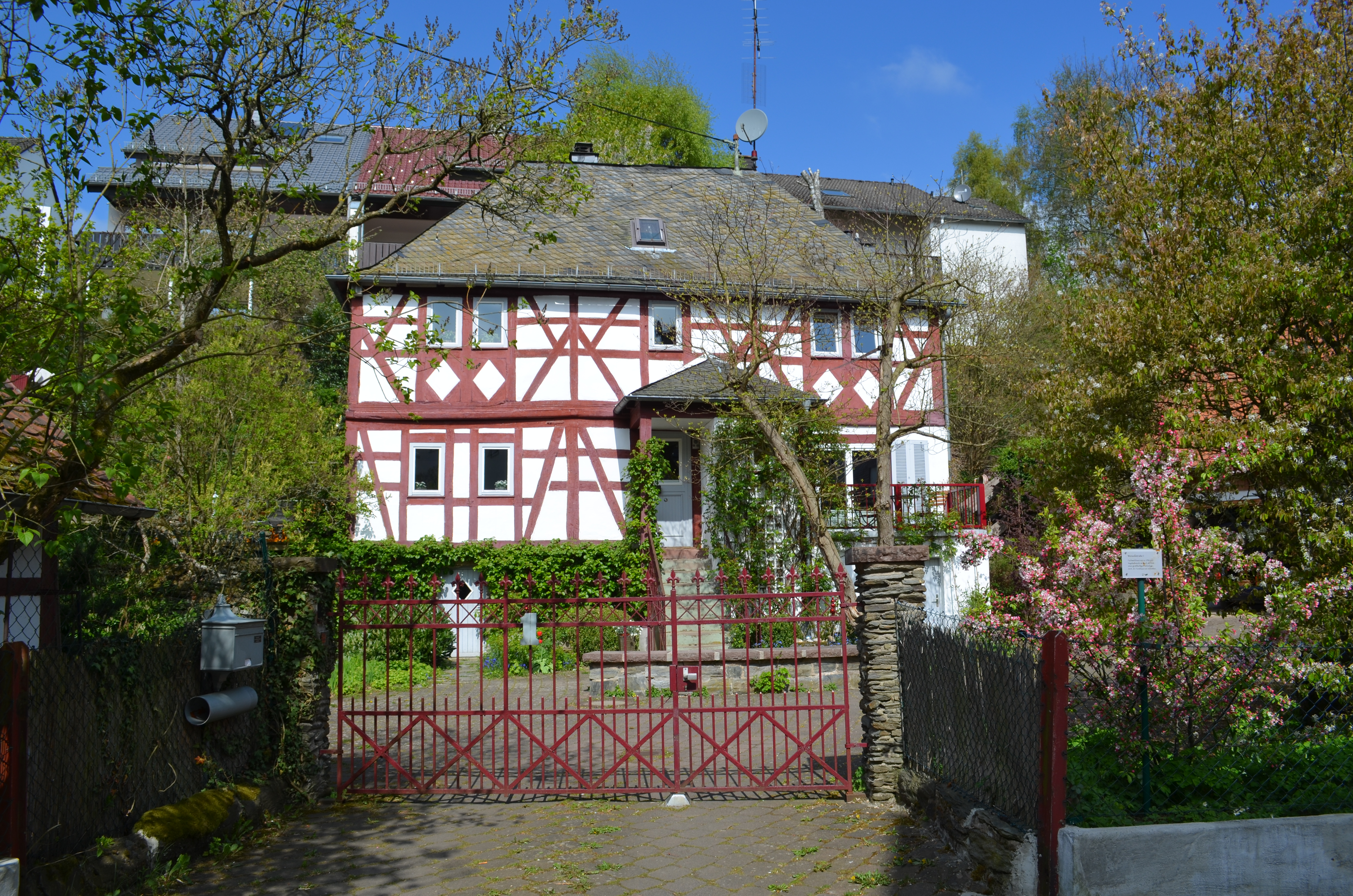 Schmitten, Wenzelstraße 1